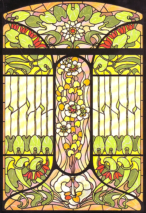 Vorlage für ein Jugendstilfenster (Berlin und New York 1900)